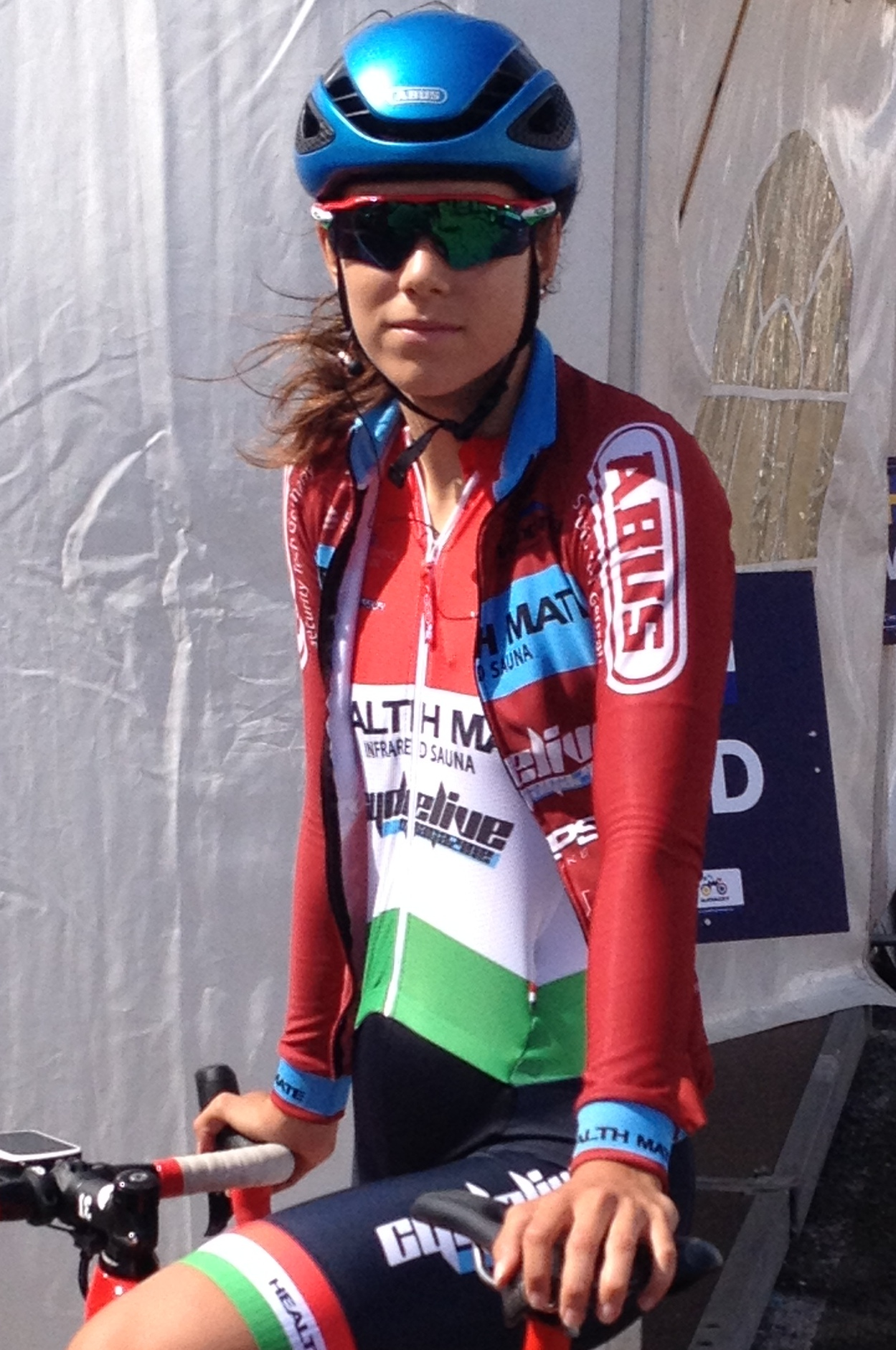 Wegwedstrijd voor vrouwen elite tijdens de Europese kampioenschappen wielrennen in Alkmaar op zaterdag 10 augustus 2019.